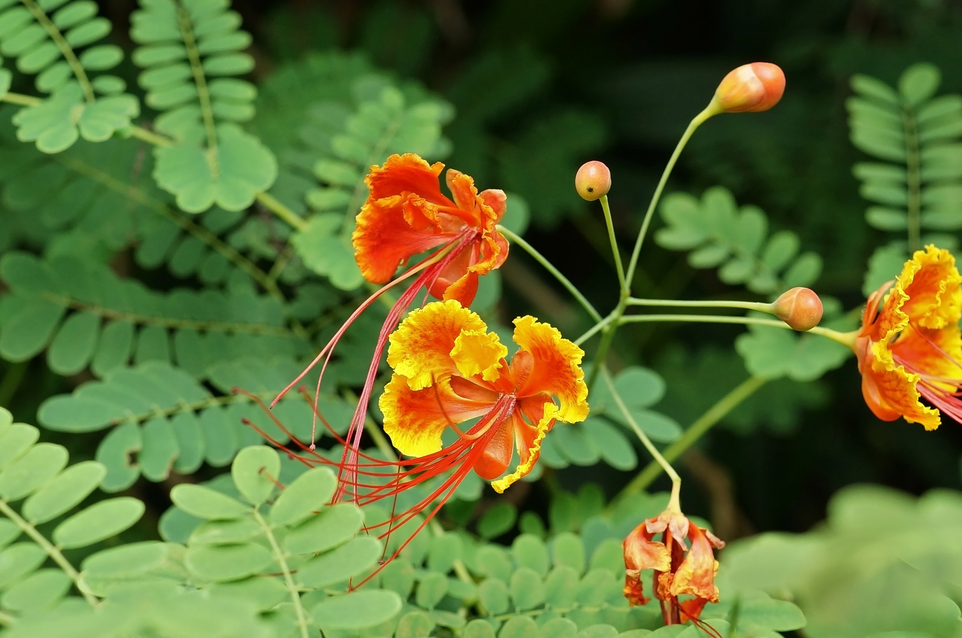 Caesalpinia pulcherrima (L.) Sw., 1781Tiếng Việt: Kim phượng